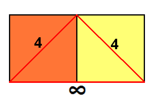 infinite prism vertex figure